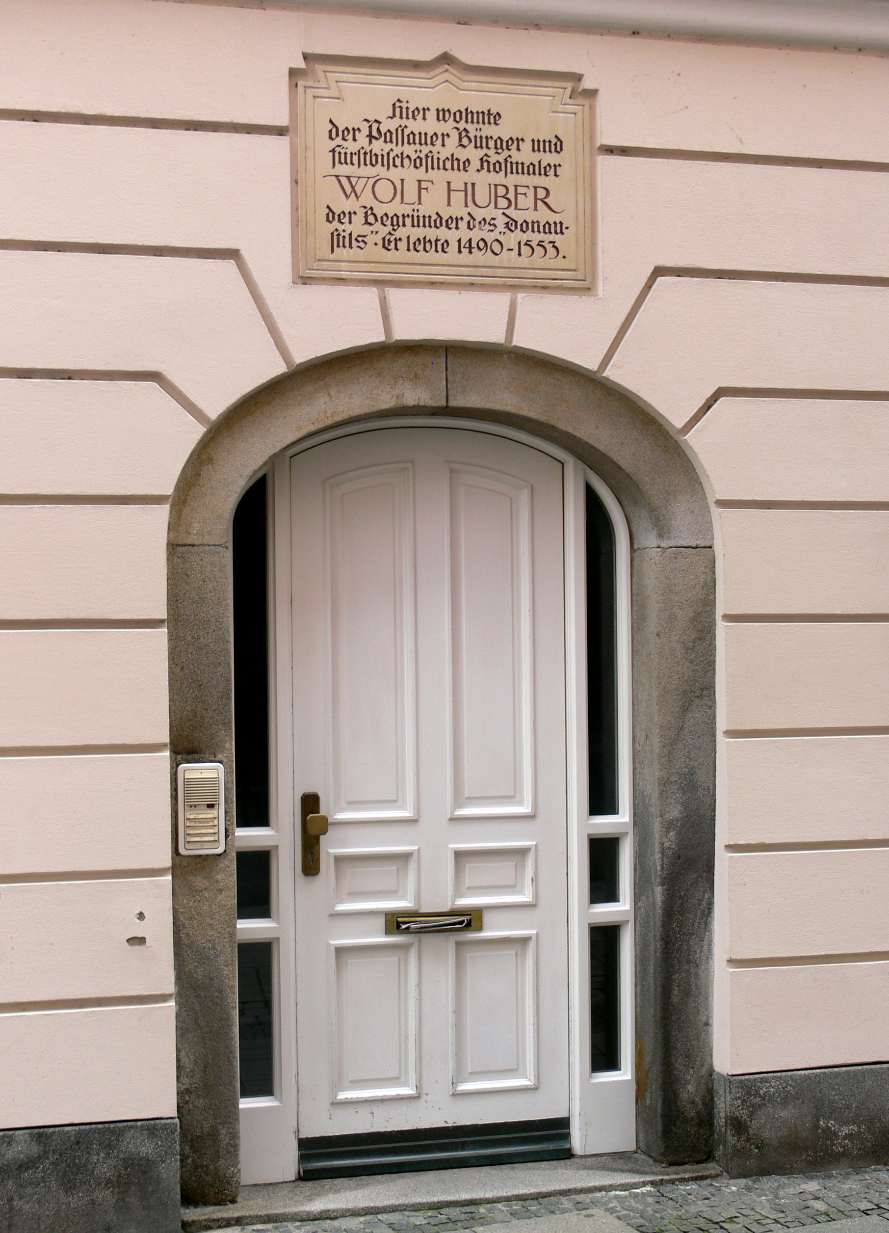 Passau, Haus in der Grabengasse mit Gedenktafel für Wolf Huber